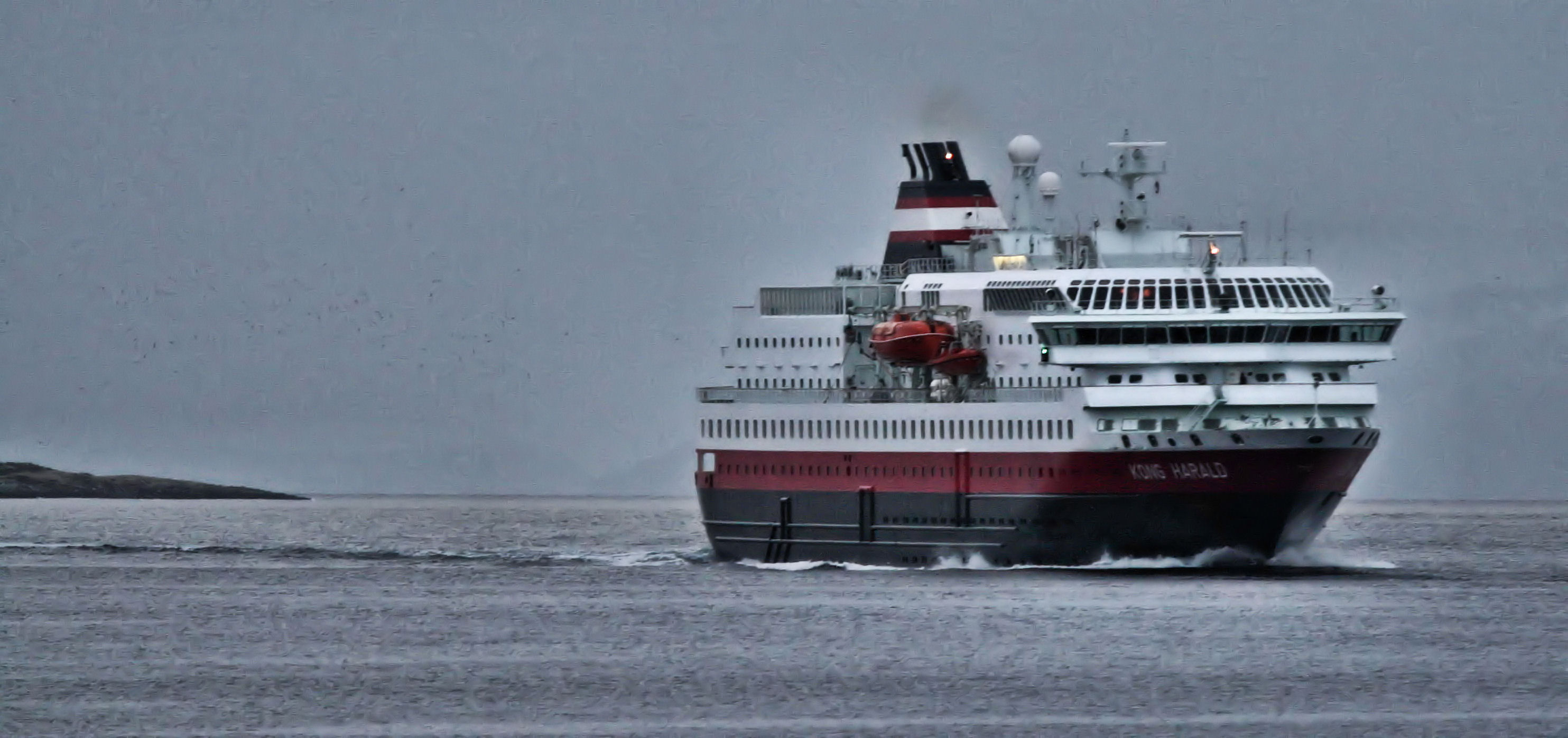 MS Kong Harald in Harstad. Winter 2005-2006